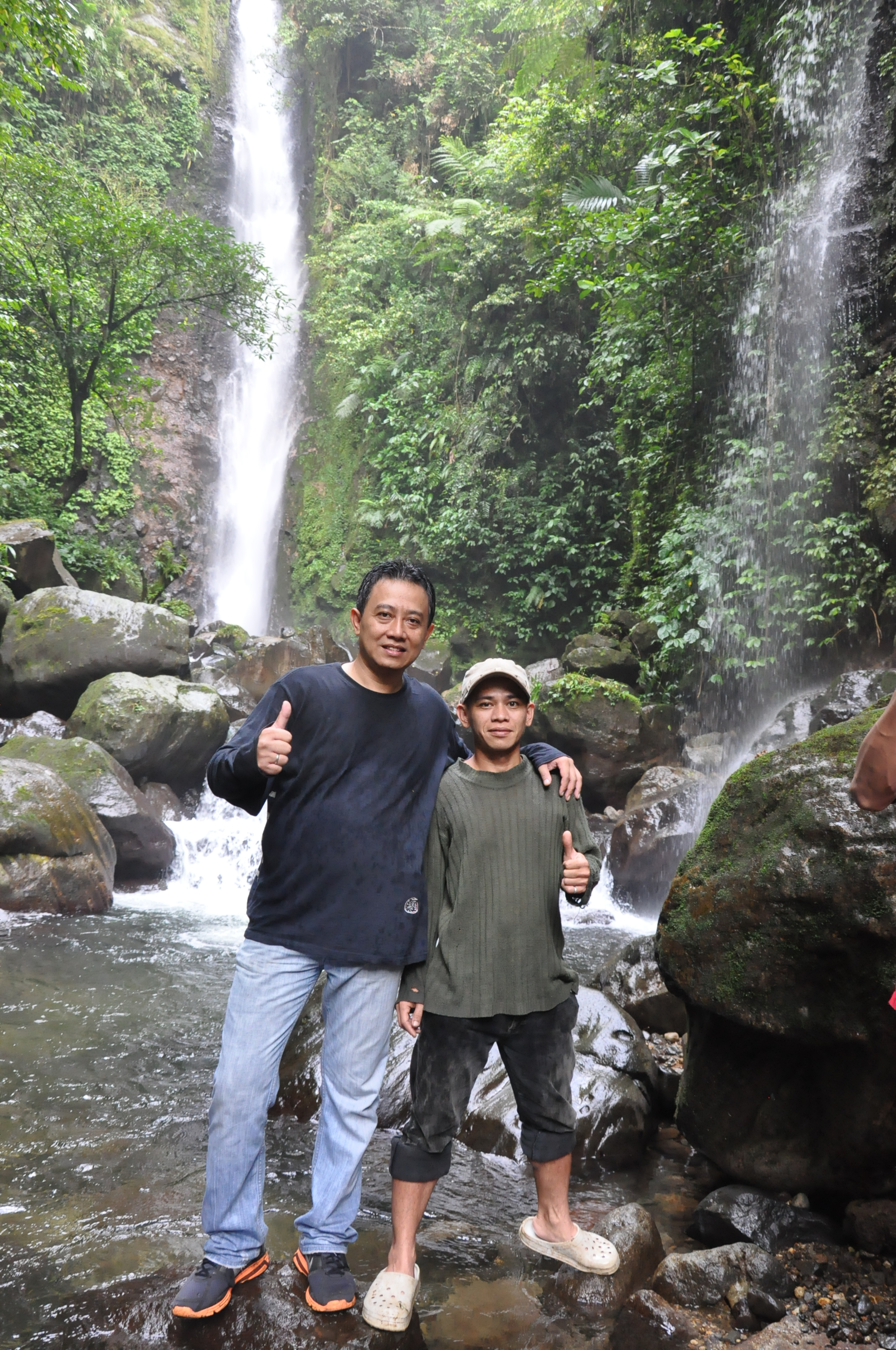 Bagus Karyanegara di Gunung Menir